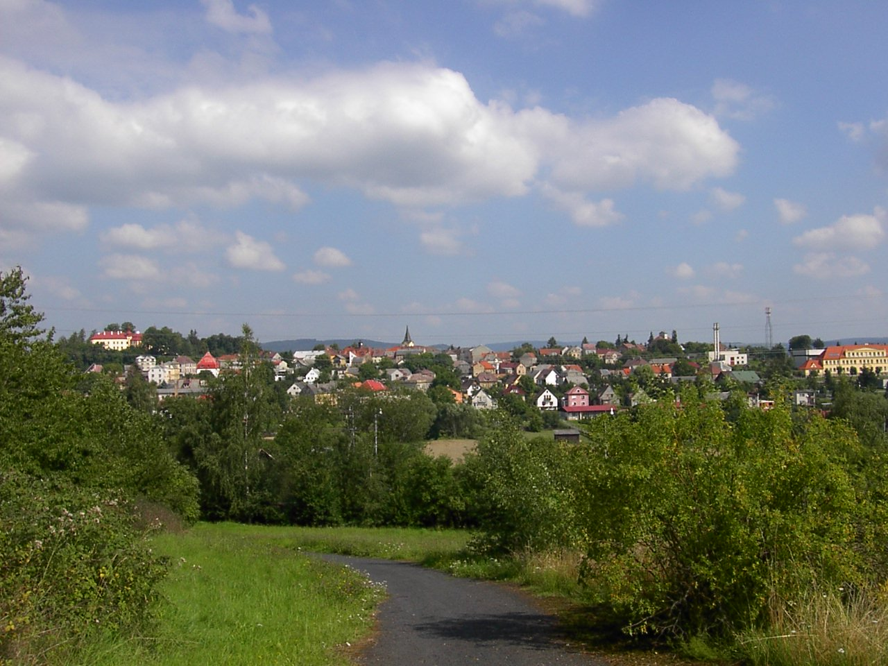 Village Bezdruzice, Czech Republic. Bezdružice od jihu